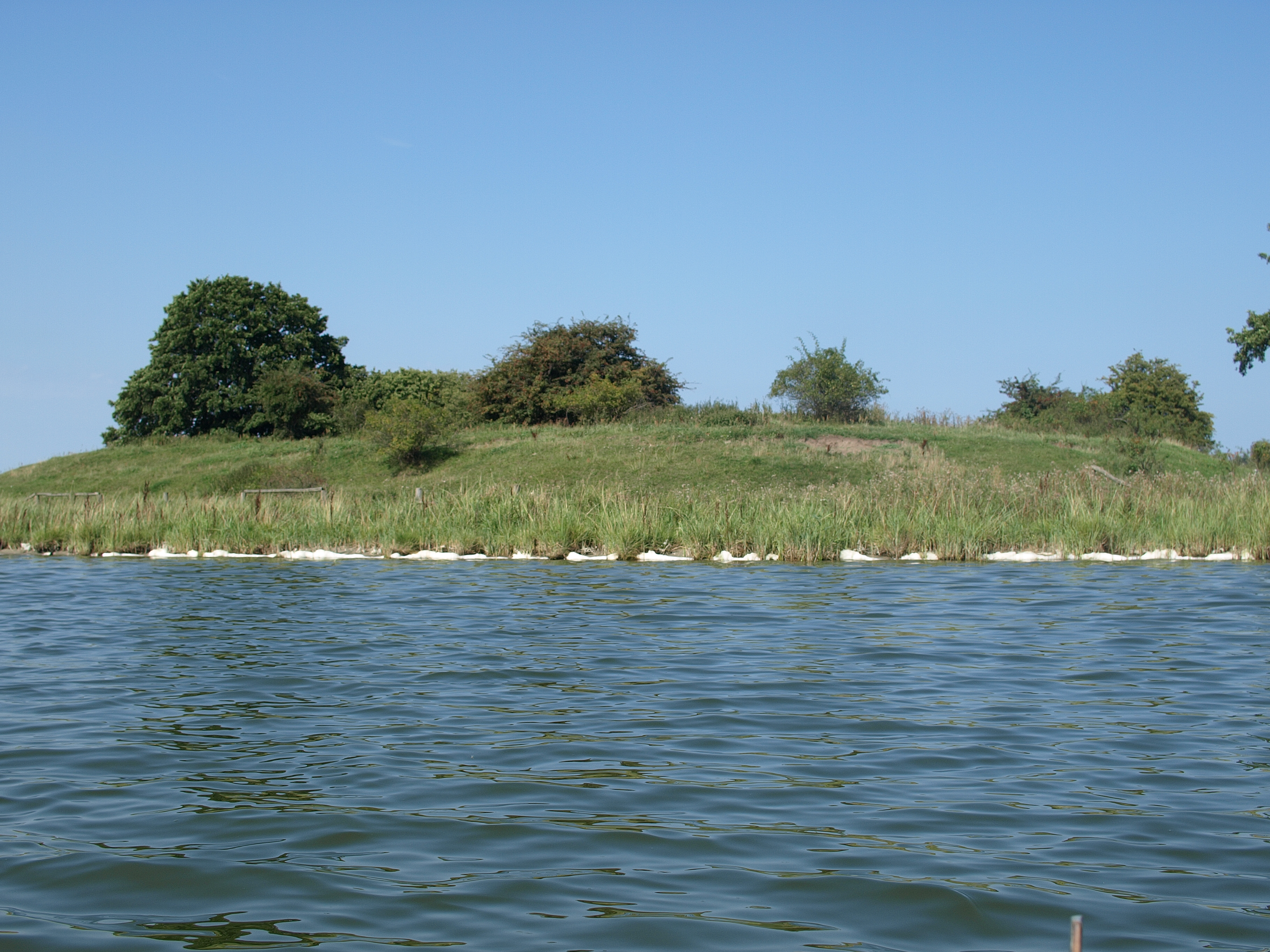 Reste einer slawischen Fluchtburg (Niederungsburg)am Nepperminer See.